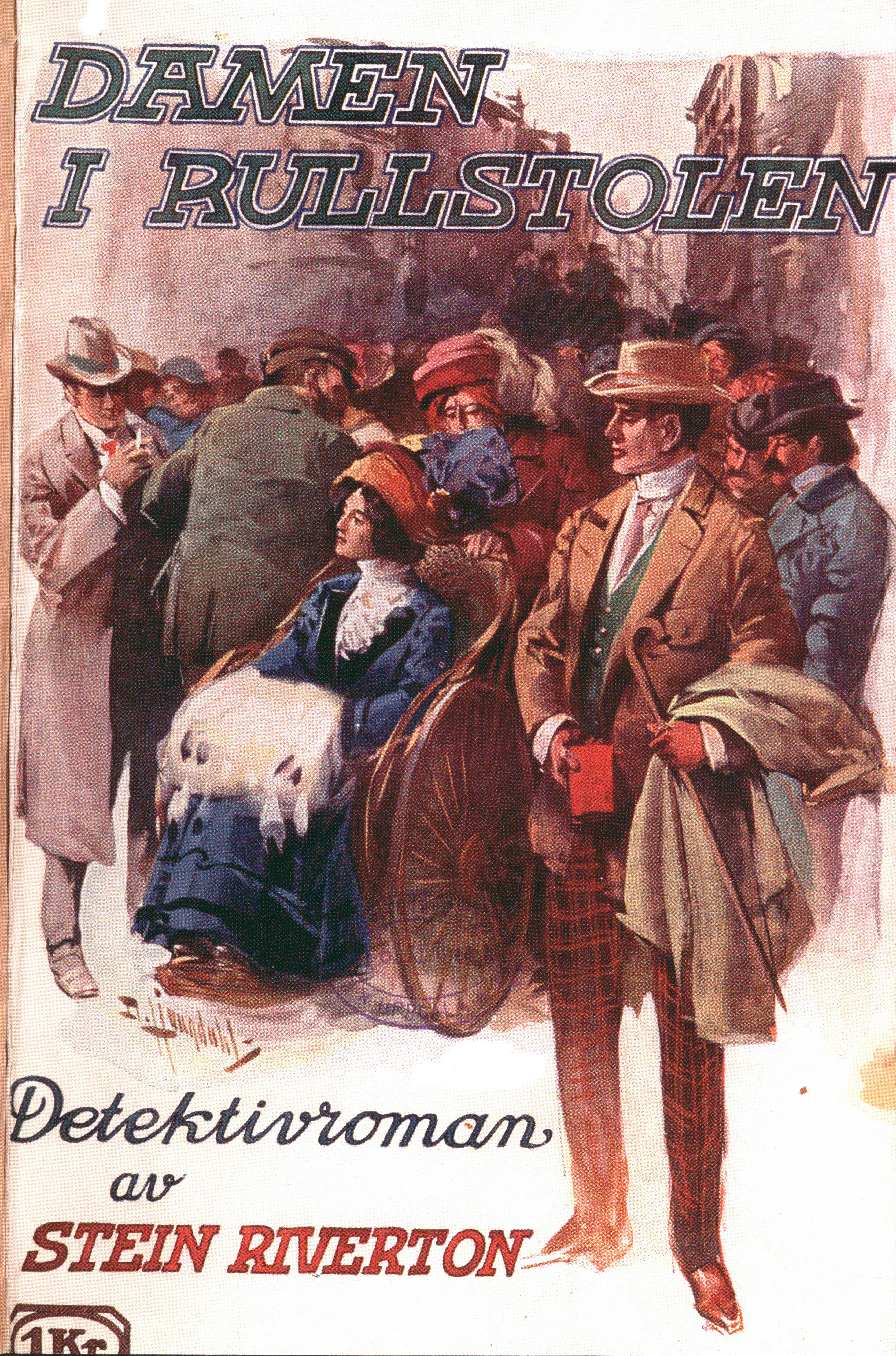 Book cover by David Ljungdahl (1870-1940): Damen i rullstolen